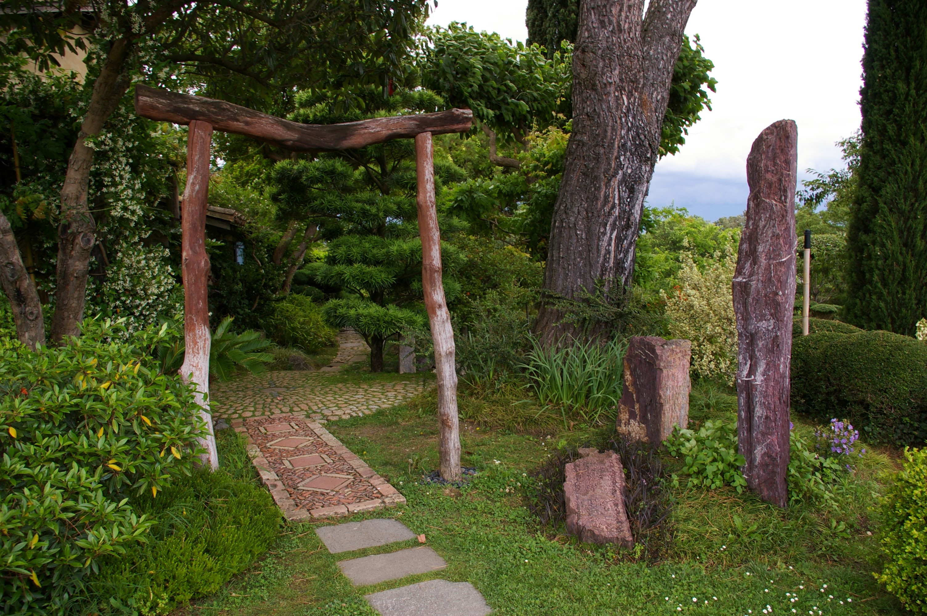 entrée du jardin d'accueil du jardin zen d'Erik Borja